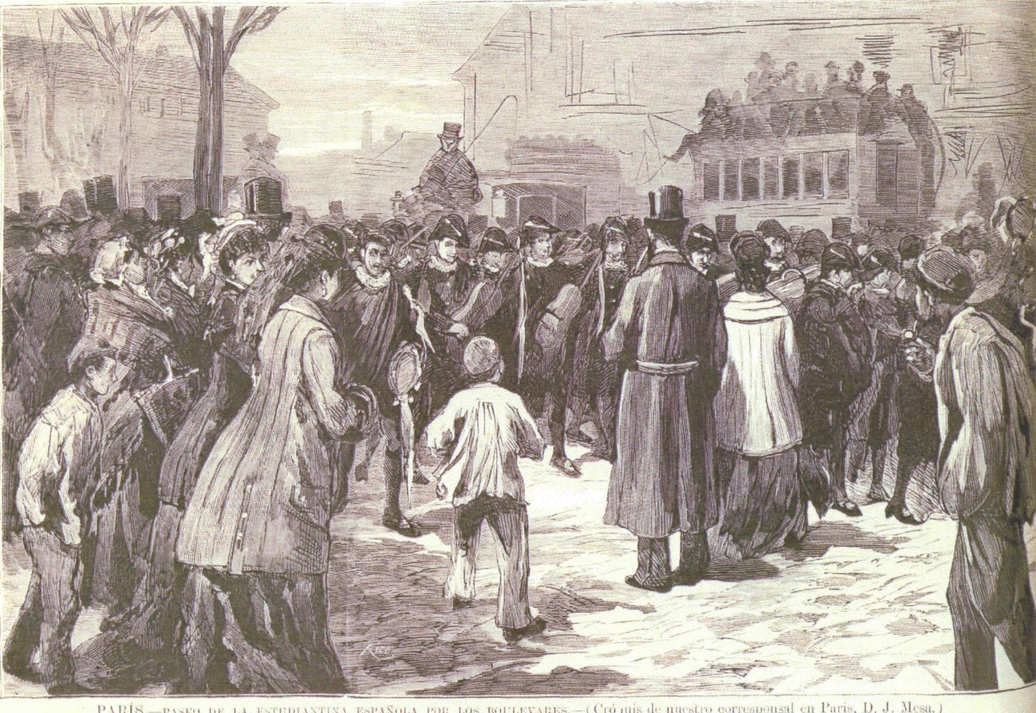 L'Estudiantina Espagnola défile dans Paris le Mardi Gras 6 mars 1878.